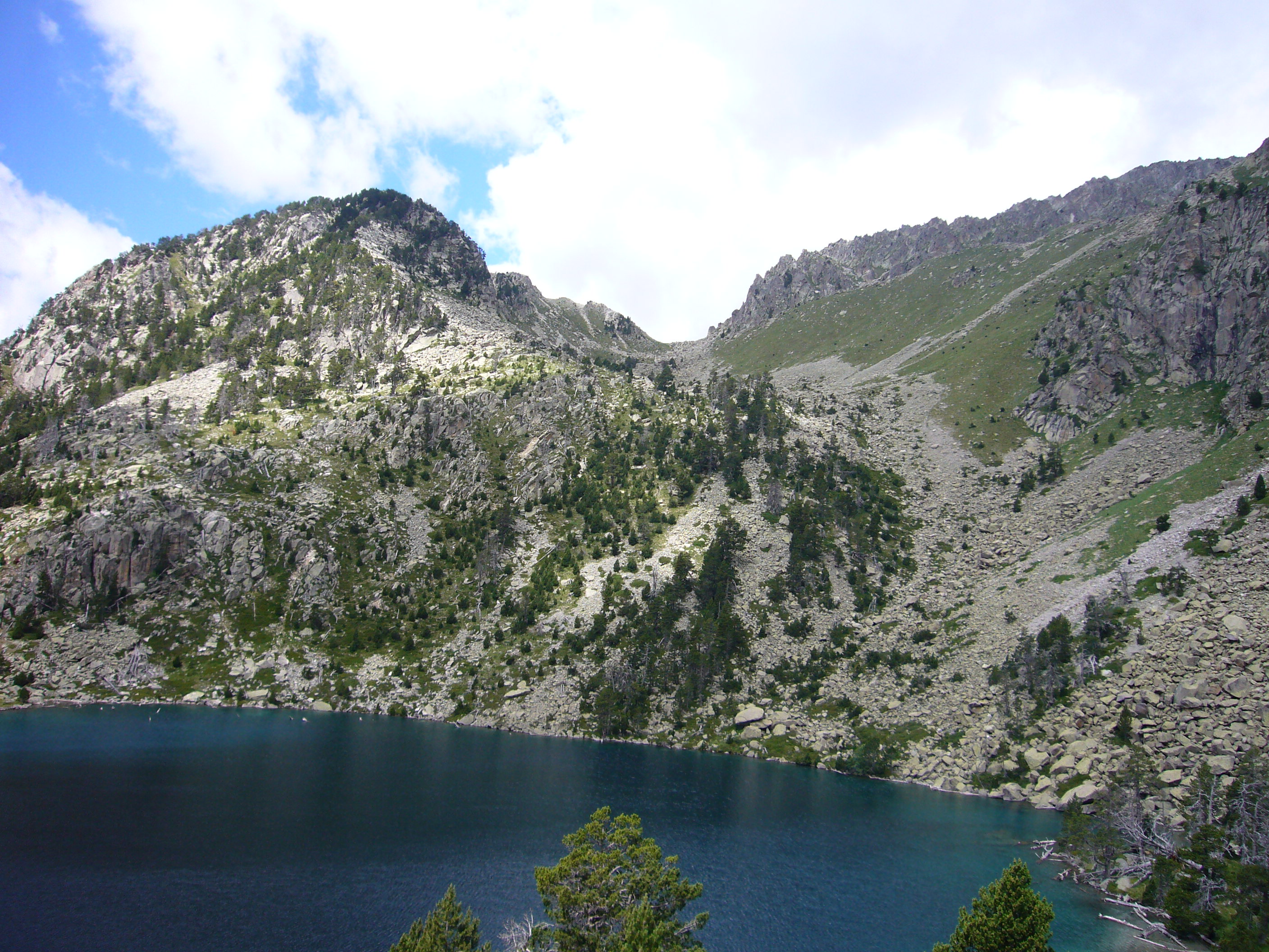 Estany de Sarradé, Cap de Copiello i Colladó d’Aigüissi, vistos des de la Vall de Sarradé; la Vall de Boí, Alta Ribagorça, Catalunya.